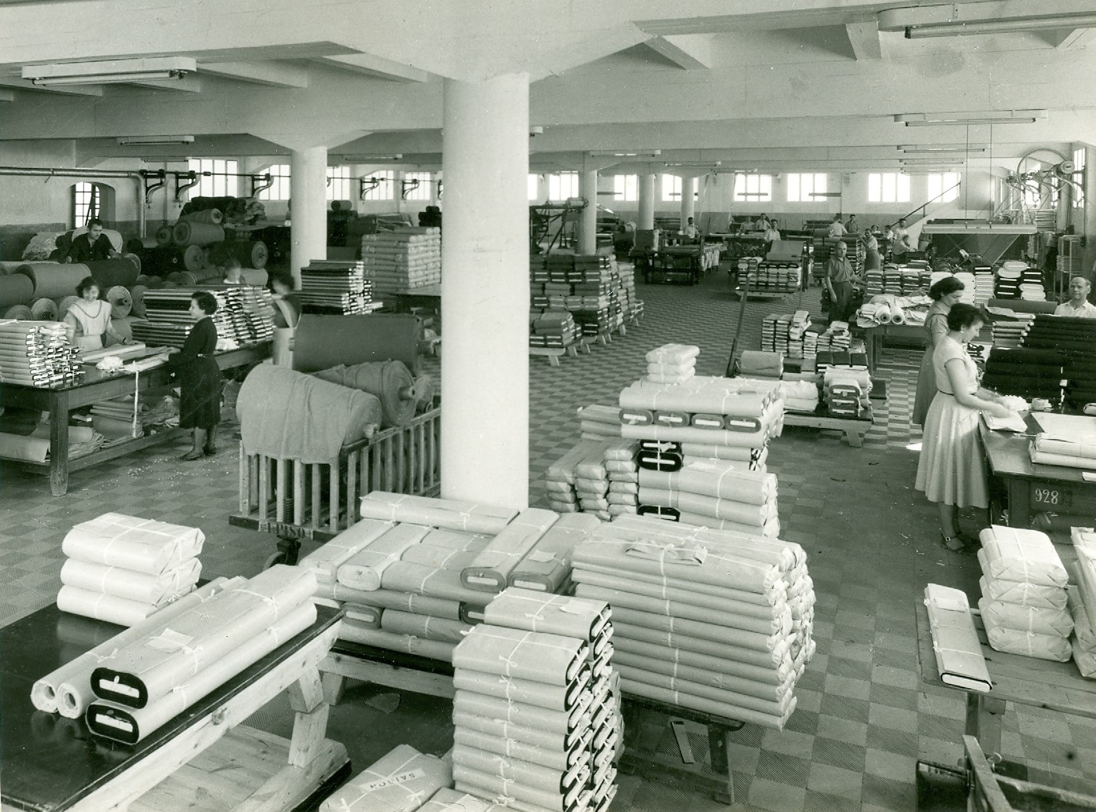 Nau d'acabats i remesa de peces de la fàbrica ca l'Isard d'Olesa de Montserrat l'any 1963.